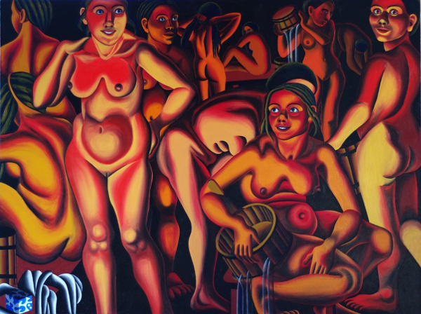 Баня (римейк "Бани" Зинаиды Серебряковой) Холст, масло. 150x200 см. 2010